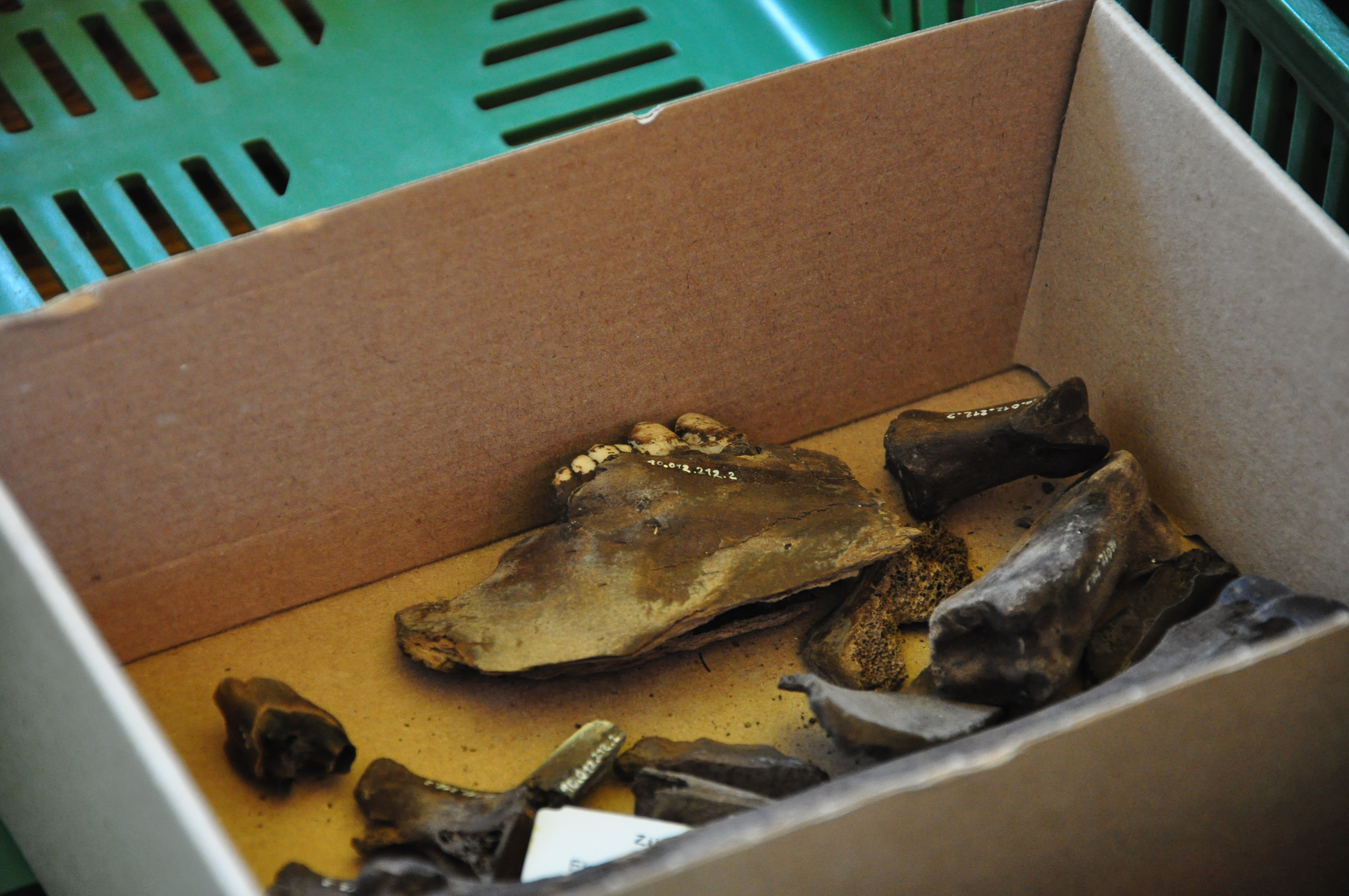 Archäologische Grabung Parkhaus Opéra in Zürich (Switzerland) : Noch nicht bestimmte Knochen aus vermutlich Nutztierhaltung